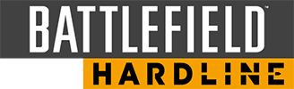 Offizielles Logo des Videospiels Battlefield Hardline.